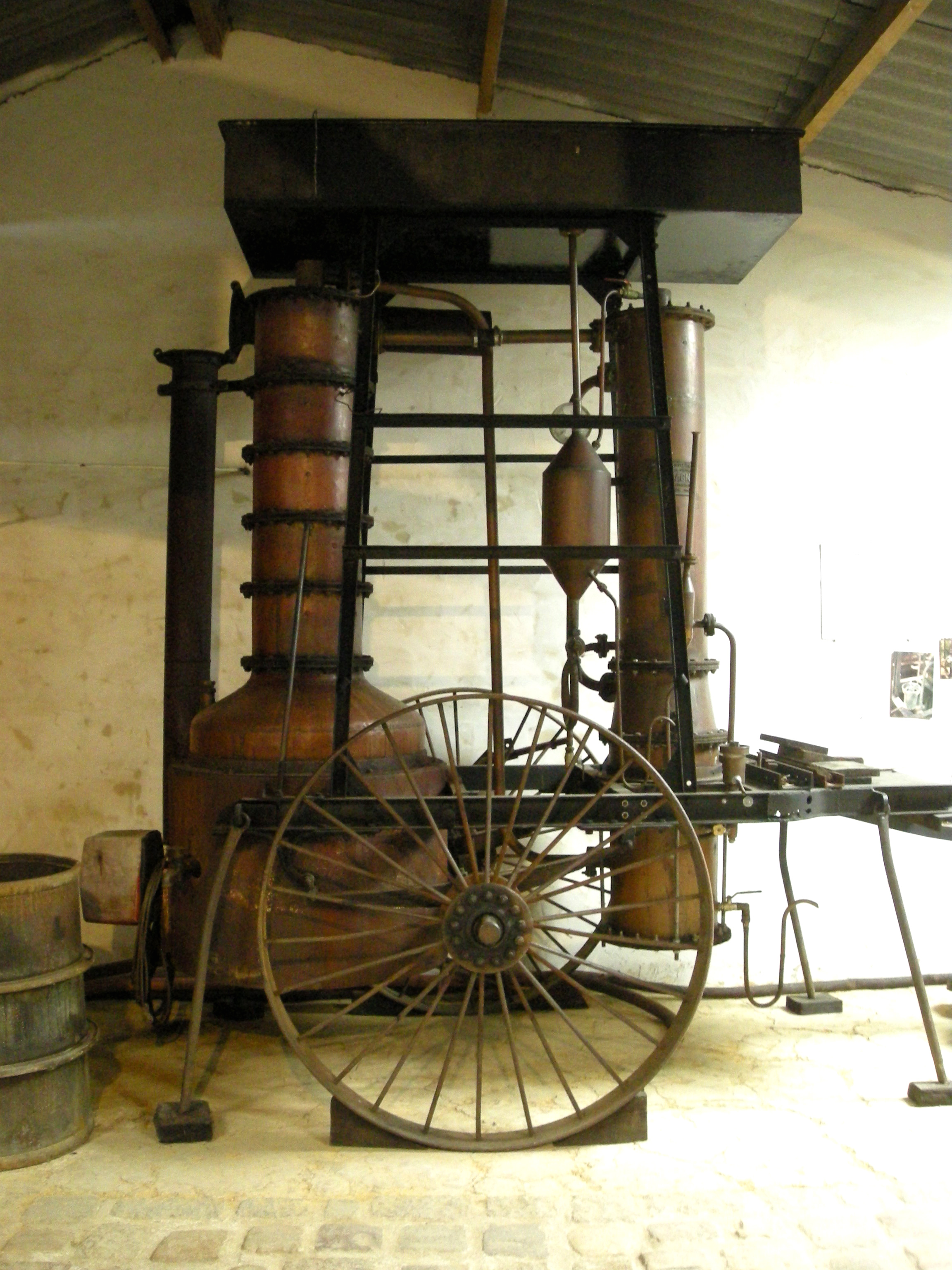 Alambic à colonne pour la distillation du Calvados (Saint-Jean-des-Champs, Normandie)